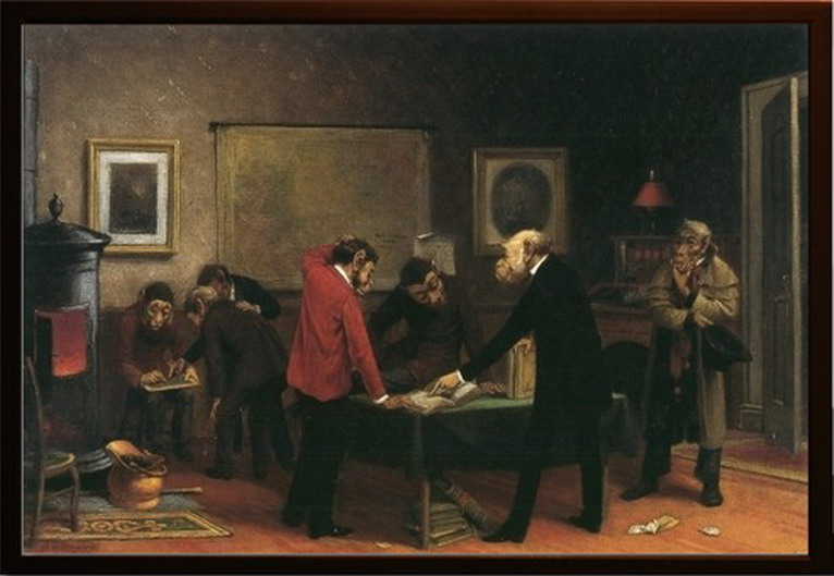 Картина-жарт з зображенням мавп-науковців за незрозумілим ділом